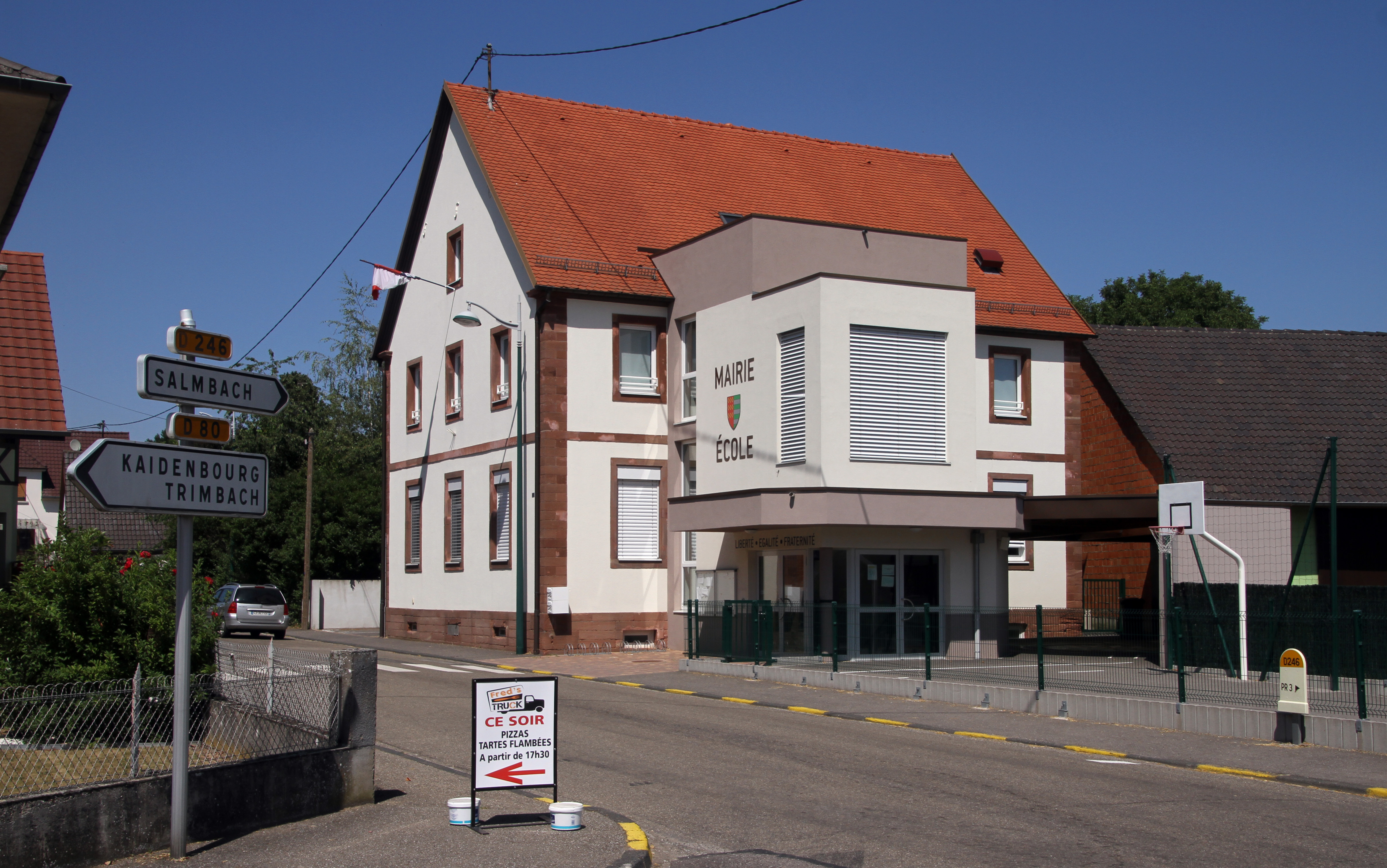 Rathaus in Oberlauterbach.